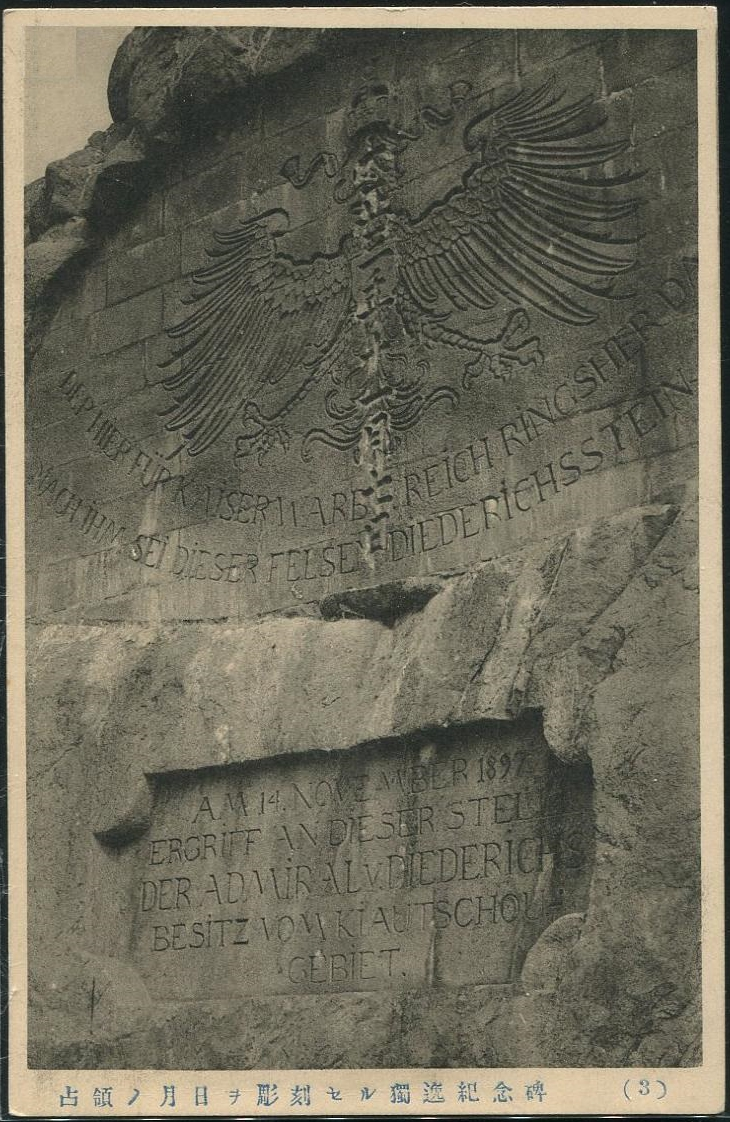 Diederichsstein Tsingtau